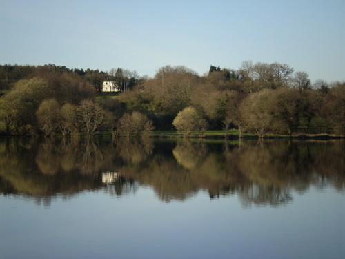 La laguna de Sobrado, en La Coruña (España)